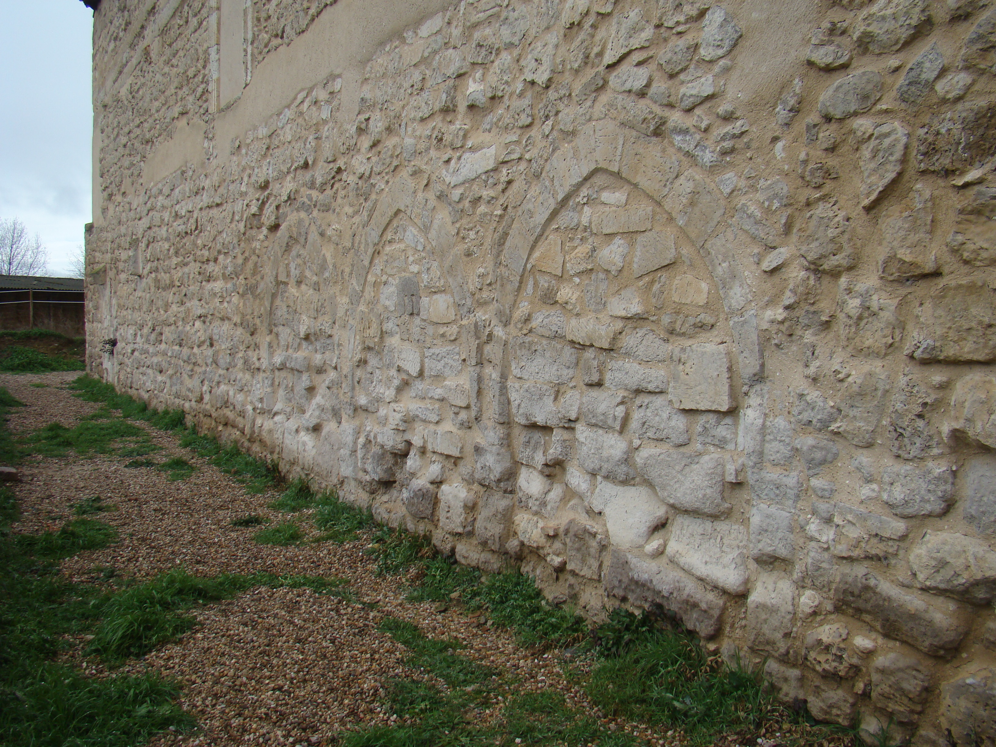 Monasterio de Palazuelos en la provincia de Valladolid. Vestigios del claustro reglar por su muro norte. Arcosolios cegados, donde hubo enterramientos.